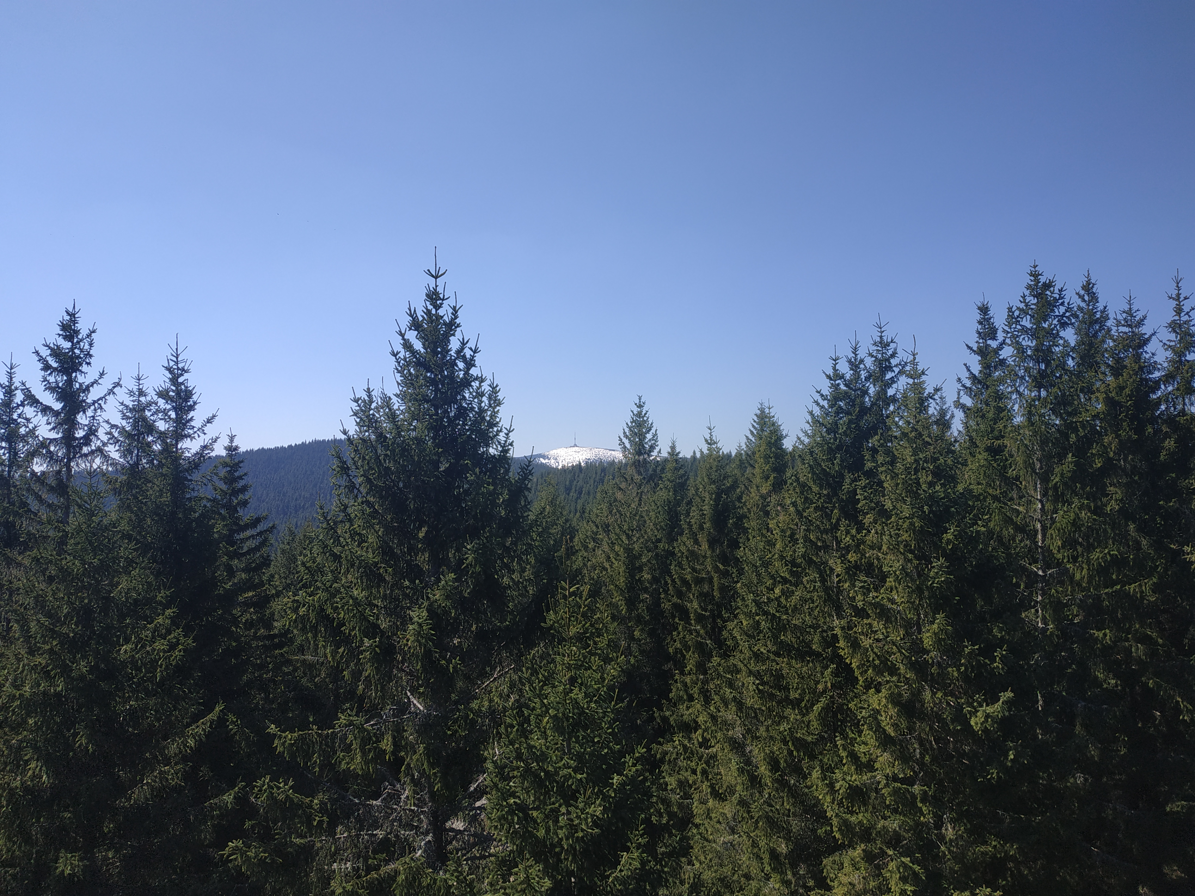 Výhled z vrcholu hory Plošina směr Praděd.